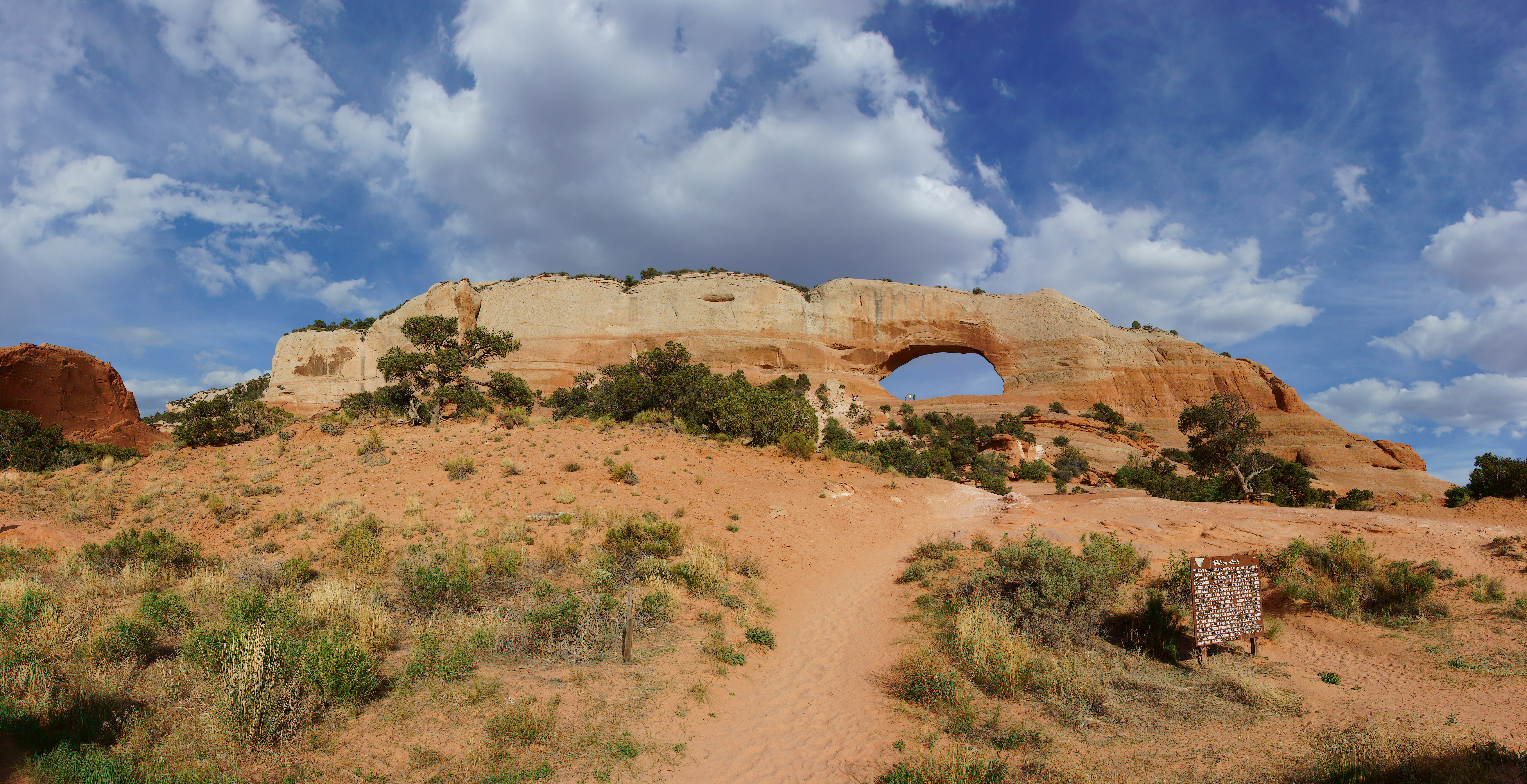 Wilson Arch, Utah, USA (Kamera: Sony Alpha 580 Panoramaaufnahme aus 11 Einzelaufnahmen, zusammengesetzt mit Microsoft ICE)